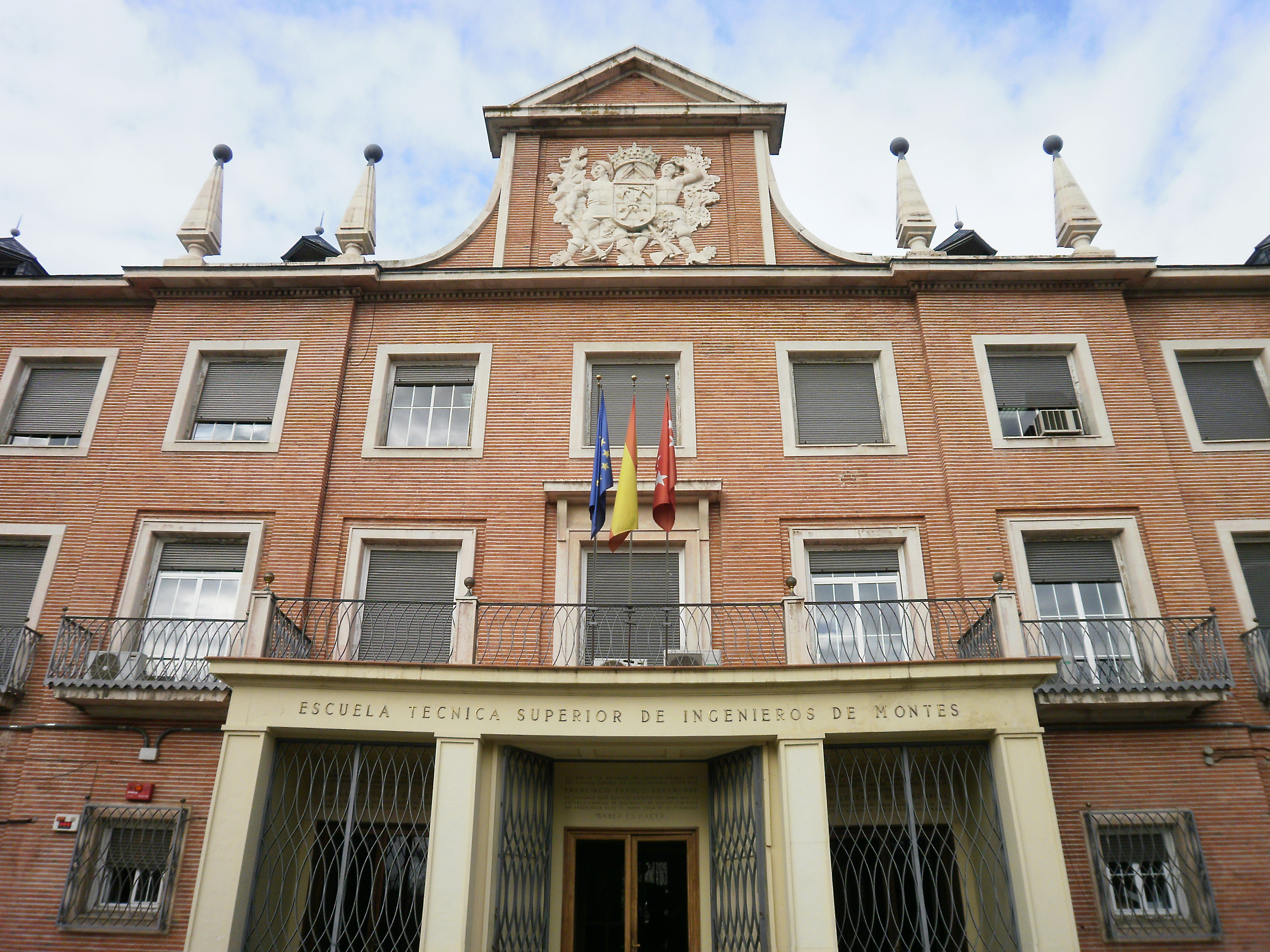 Entrada principal de la Escuela Técnica Superior de Ingenieros de Montes de la Universidad Politécnica de Madrid en Ciudad Universitaria.